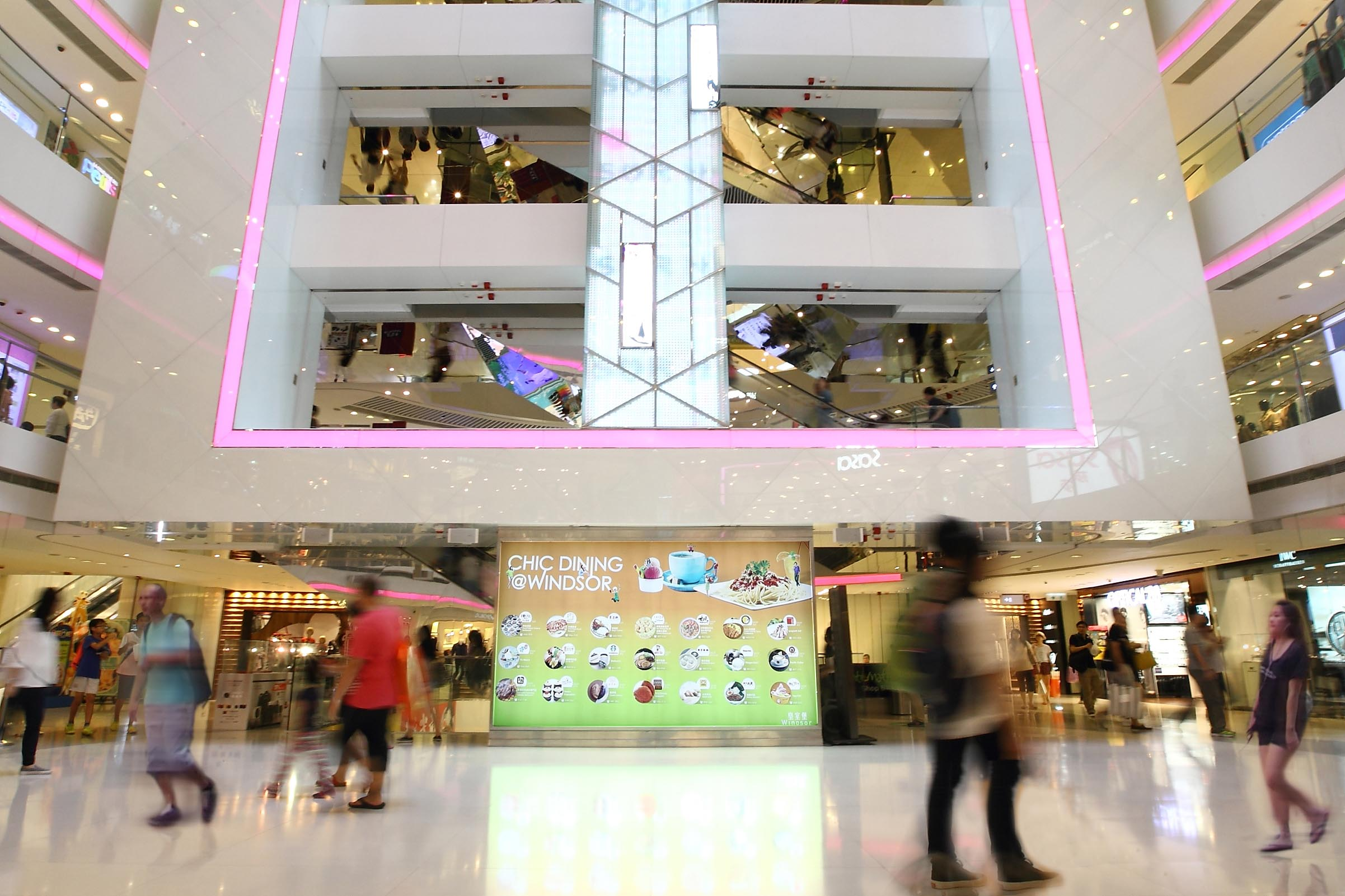 中文（香港）: 翻新後皇室堡中庭